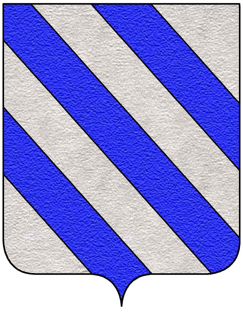 Stemma della famiglia Obizzi